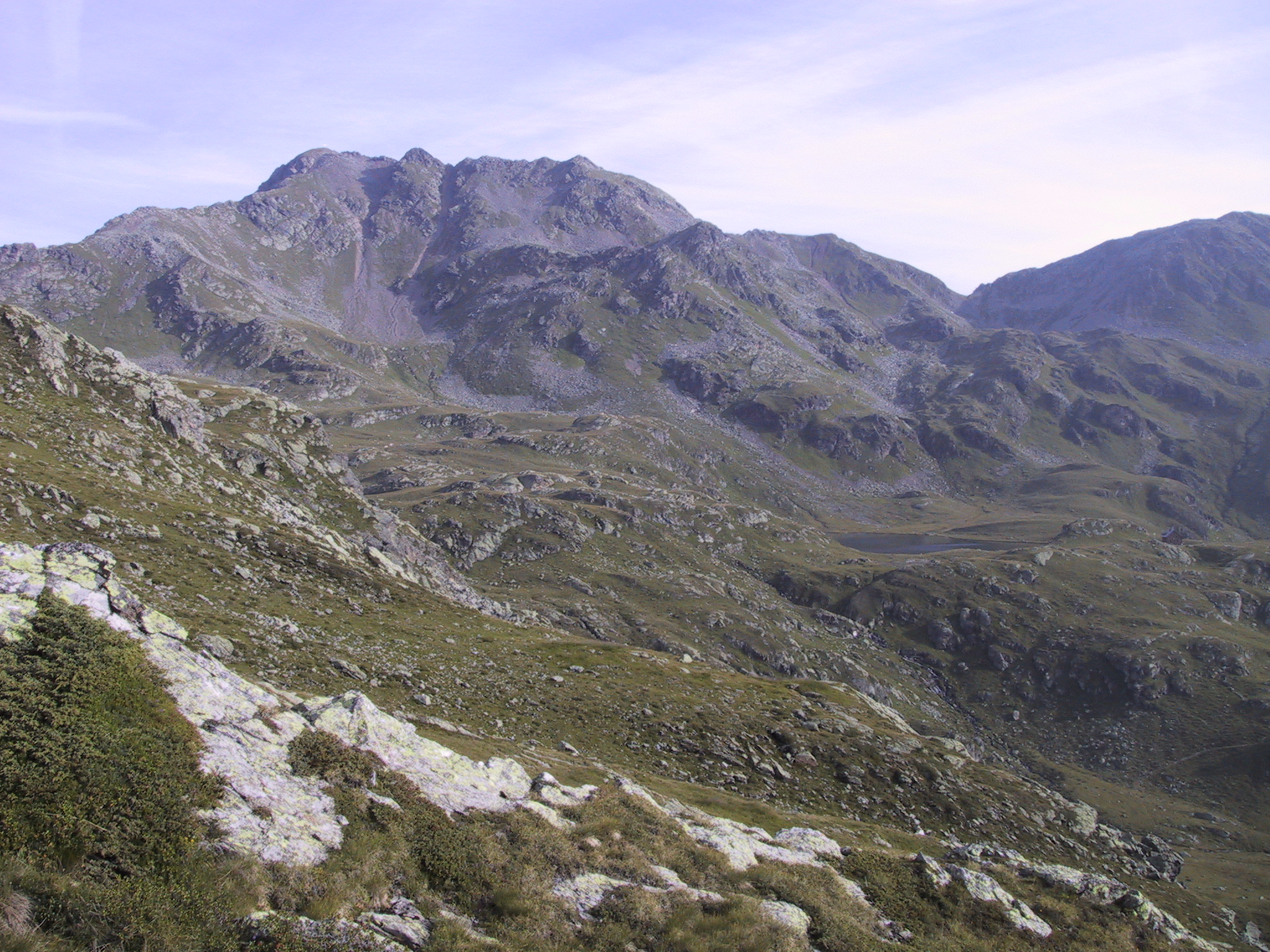 Kreuzeck in der Kreuzeckgruppe mit Glanzsee und Feldnerhütte, Kärnten.